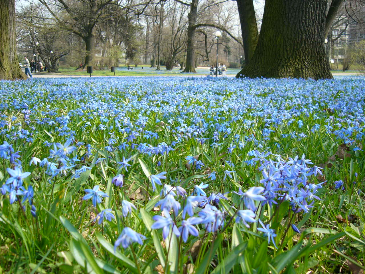 Park Klepacza w Łodzi, kwitnące cybulice